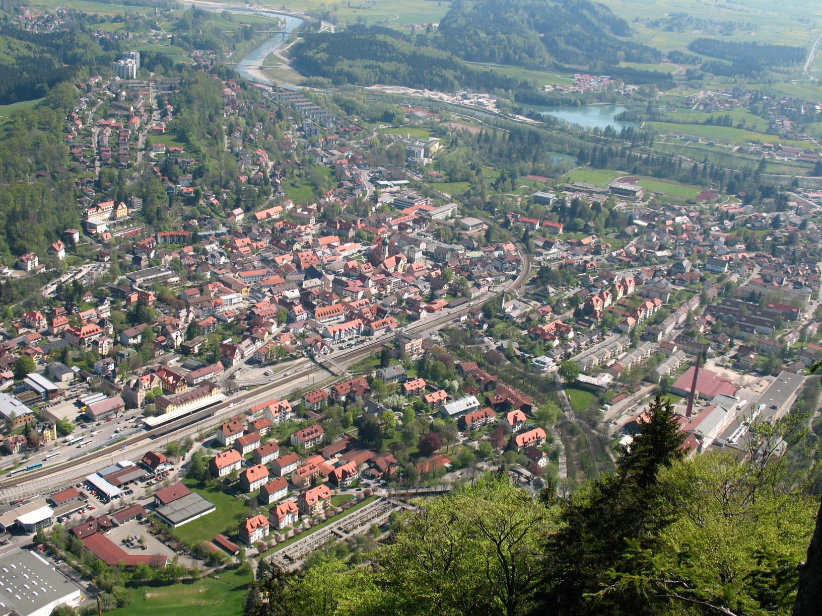 Blick vom Horn (Kanzel) auf Immenstadt